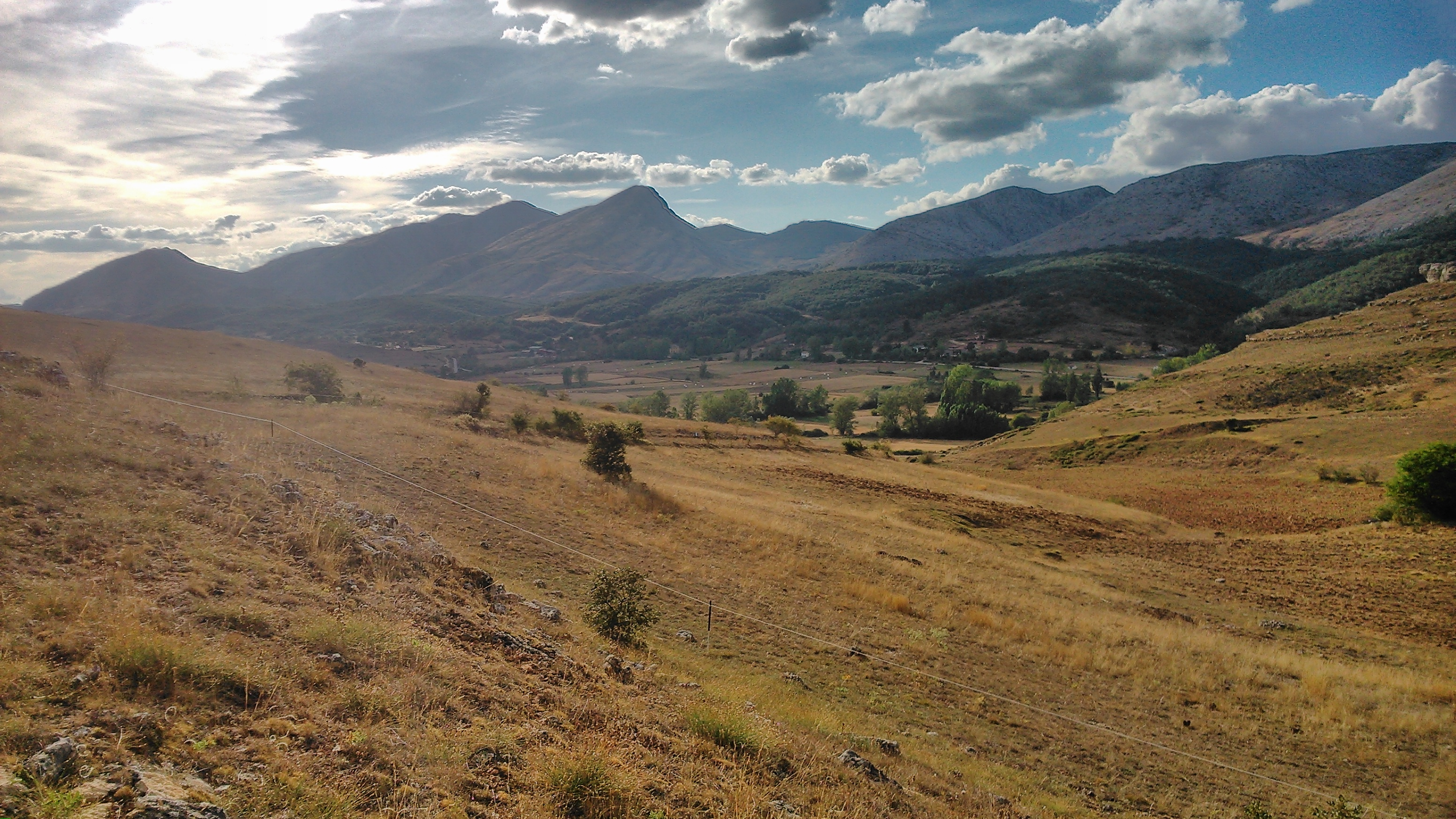 Fotografía de La Loma y la Sierra del Brezo, des del Punto geodésico de Tarilonte de la Peña